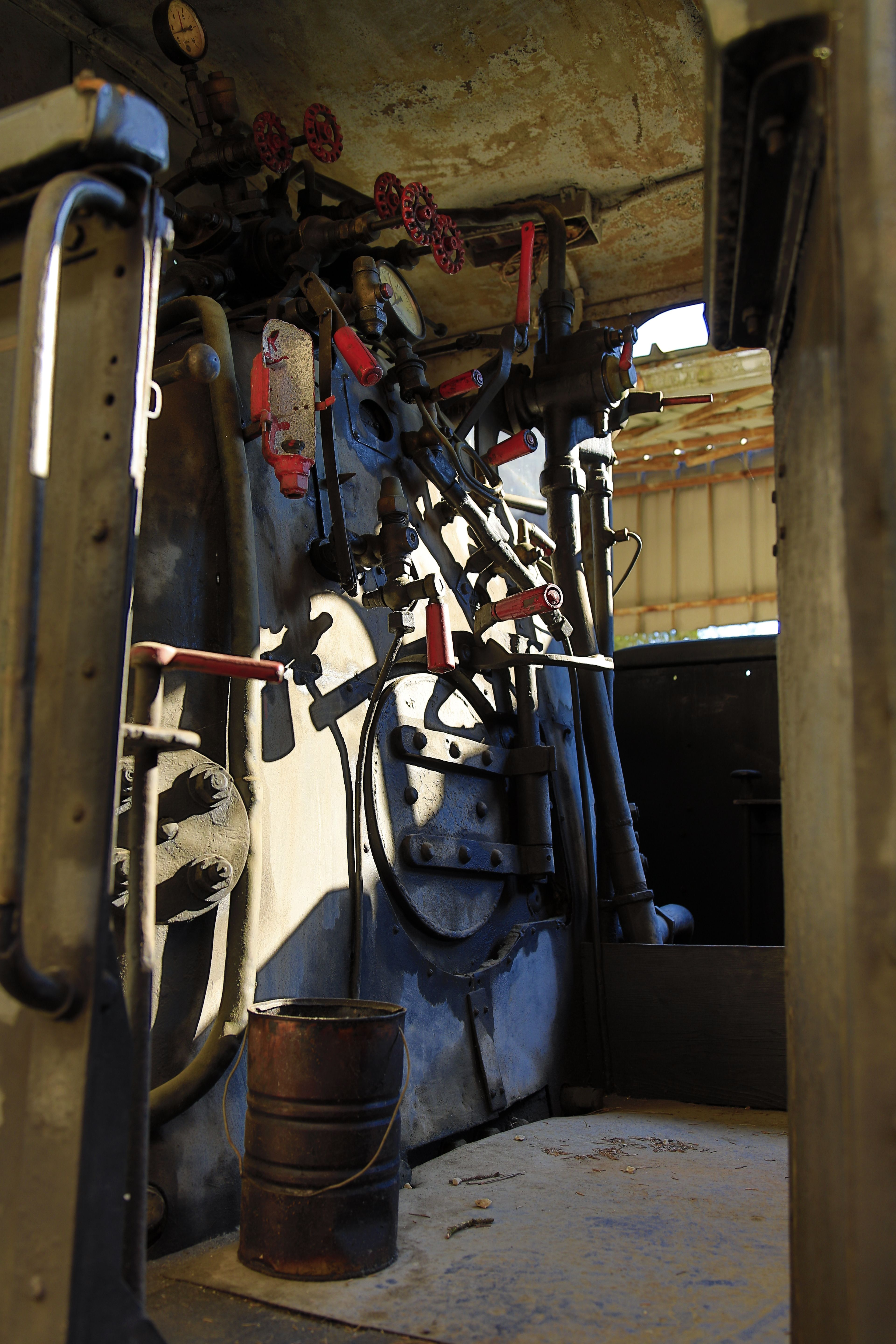 Führerstand einer 1’D1’-Schnellzuglokomotive